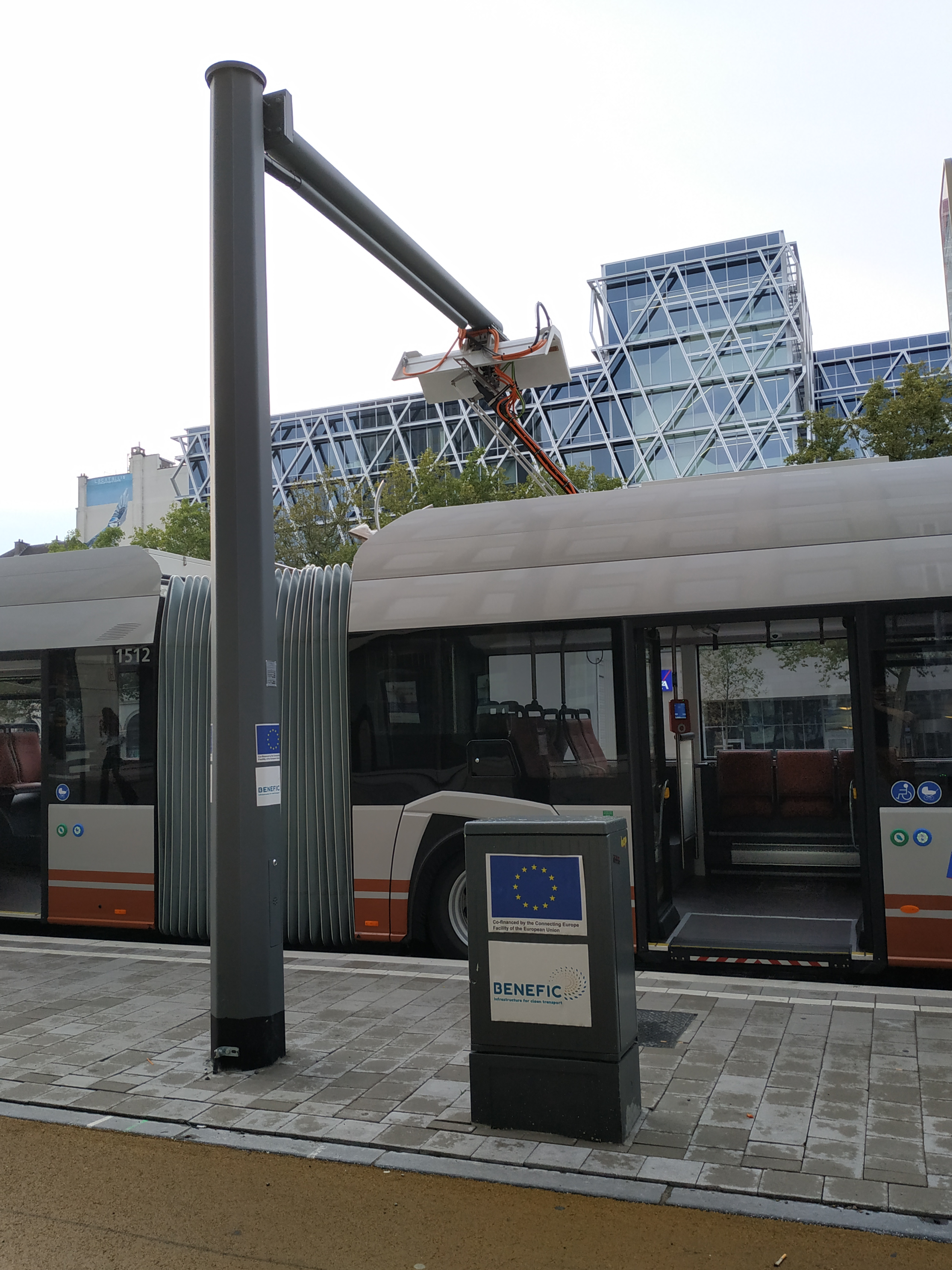 zoom sur le système de charge du Solaris Urbino 18 electric du réseau STIB/MIVB à une station de Bruxelles